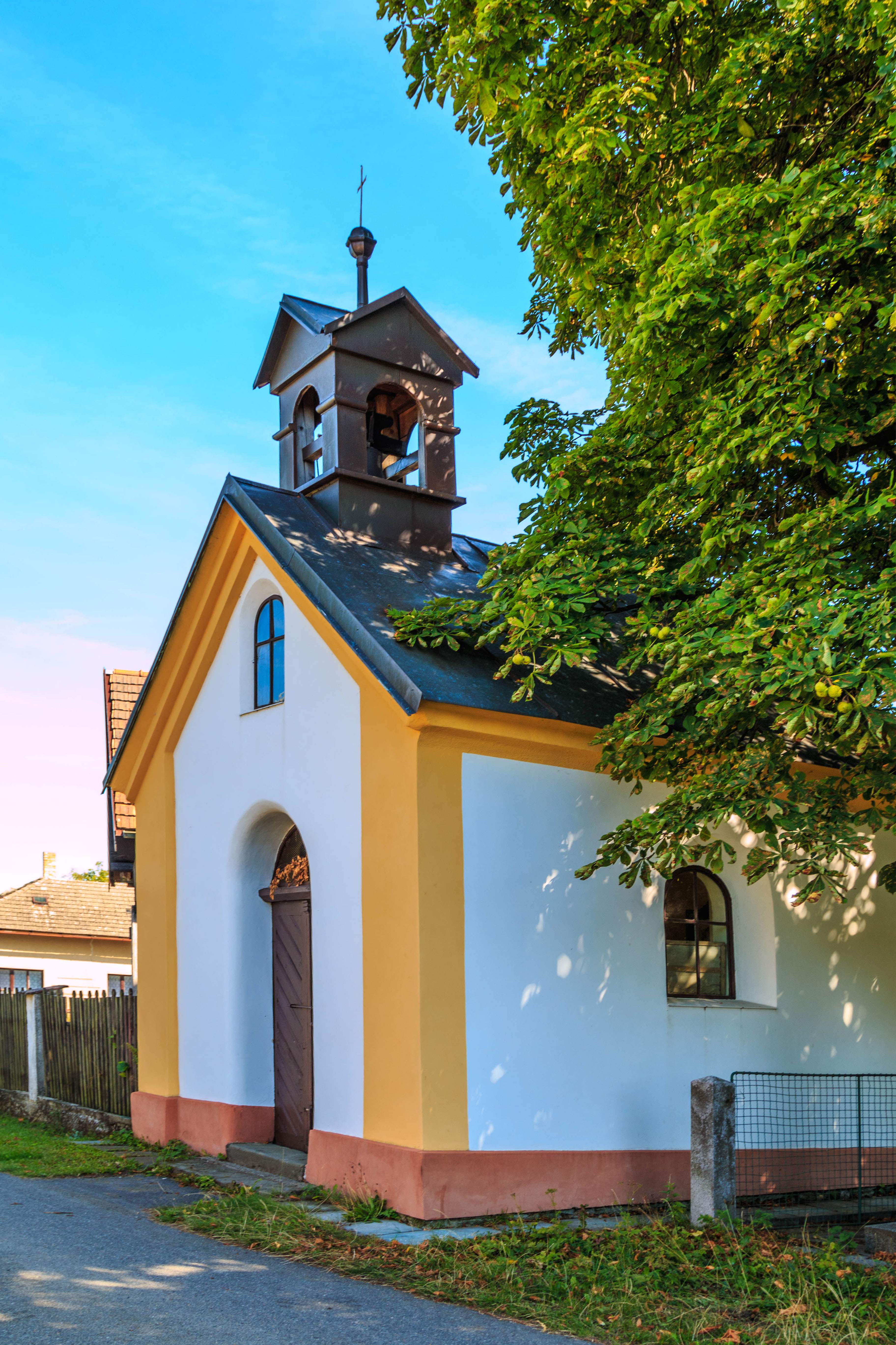 Střítěž u Hluboké kaple